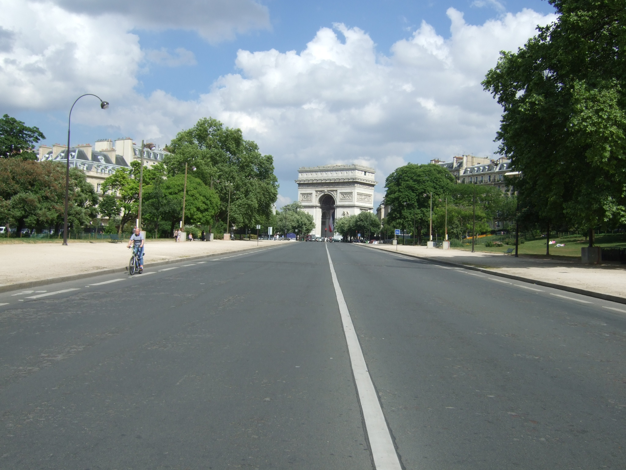 jour calme